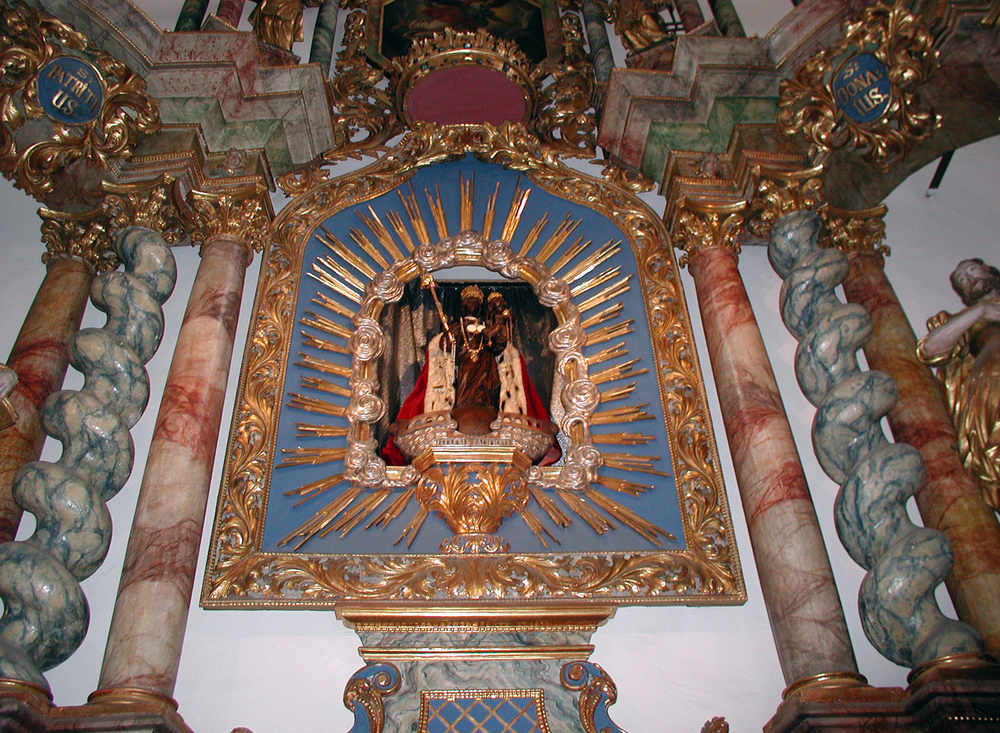 St. Maria vom Frieden, Köln